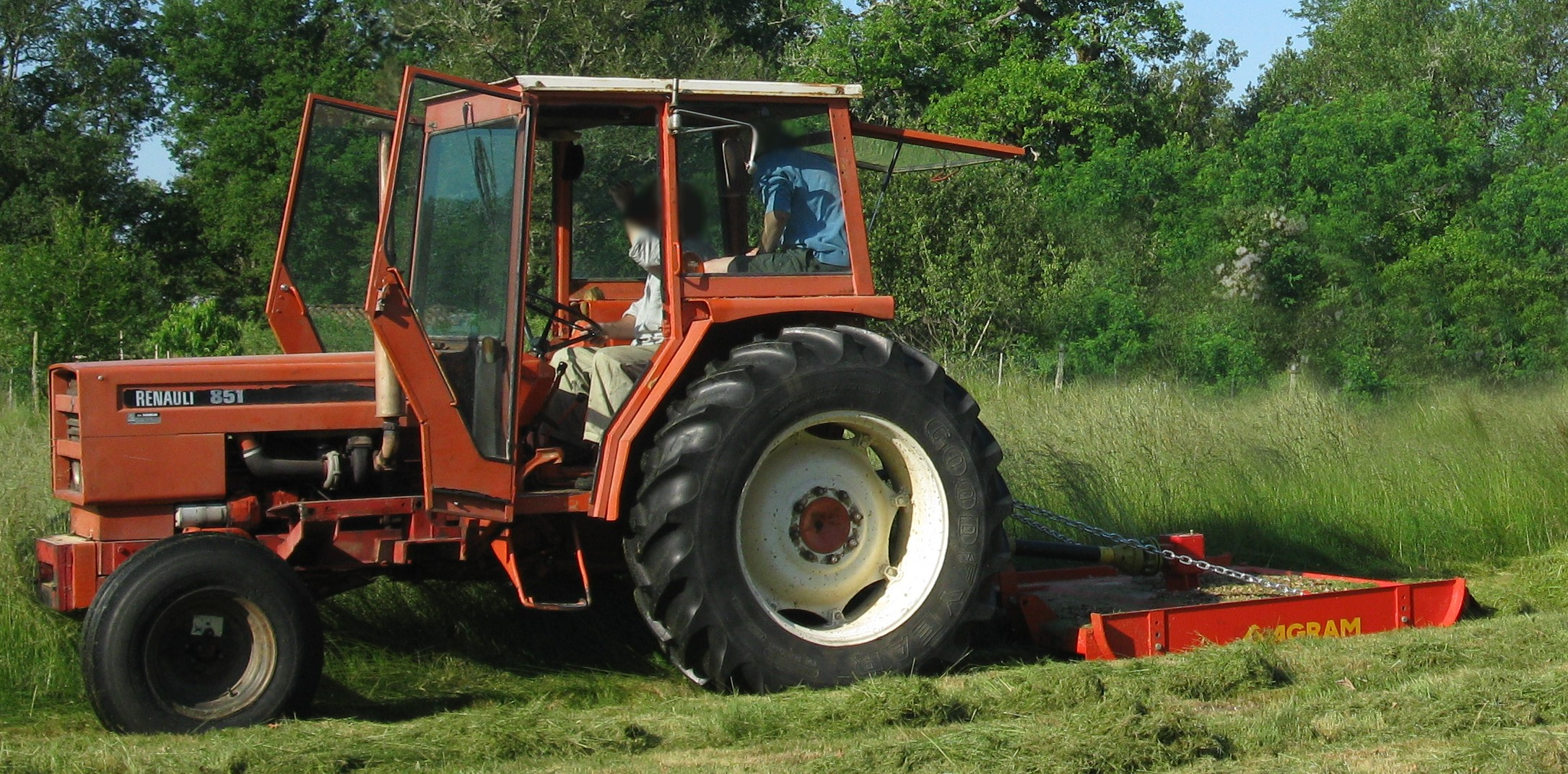 Opération de gyrobroyage dans les Landes durant l'été 2009.